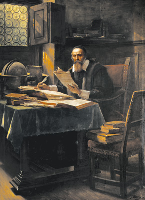 Václav Brožík - Jan Ámos Komenský ve své pracovně v Amsterodamu